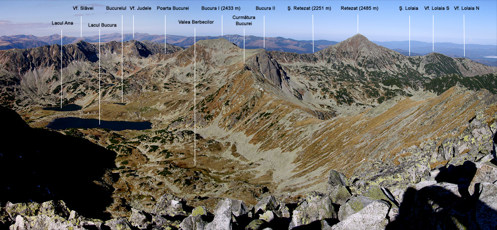 Retezatul central (Foto: Emi Cristea)